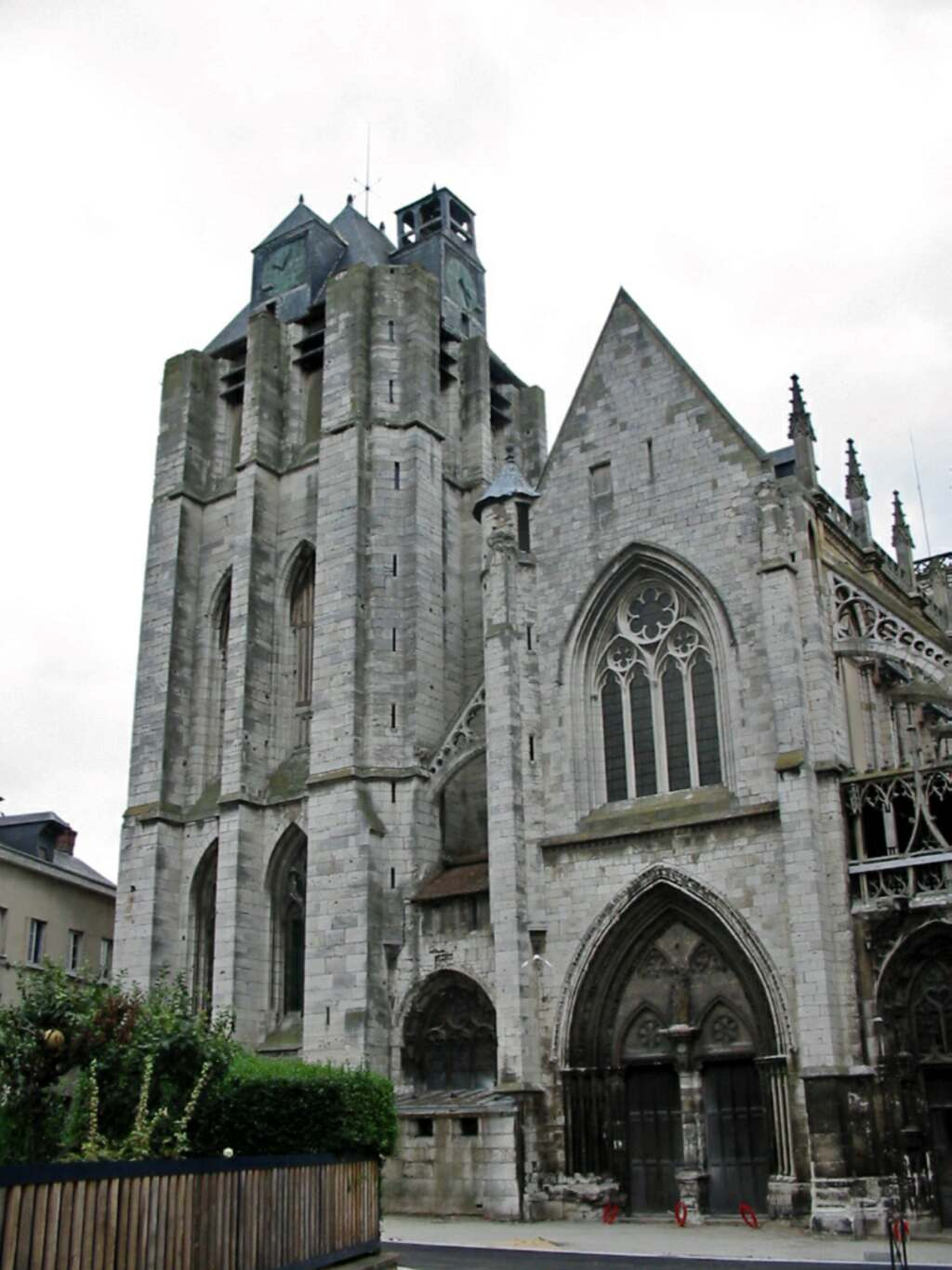 Eglise Notre-Dame de Louviers (Eure) Photo JH Mora, août 2005